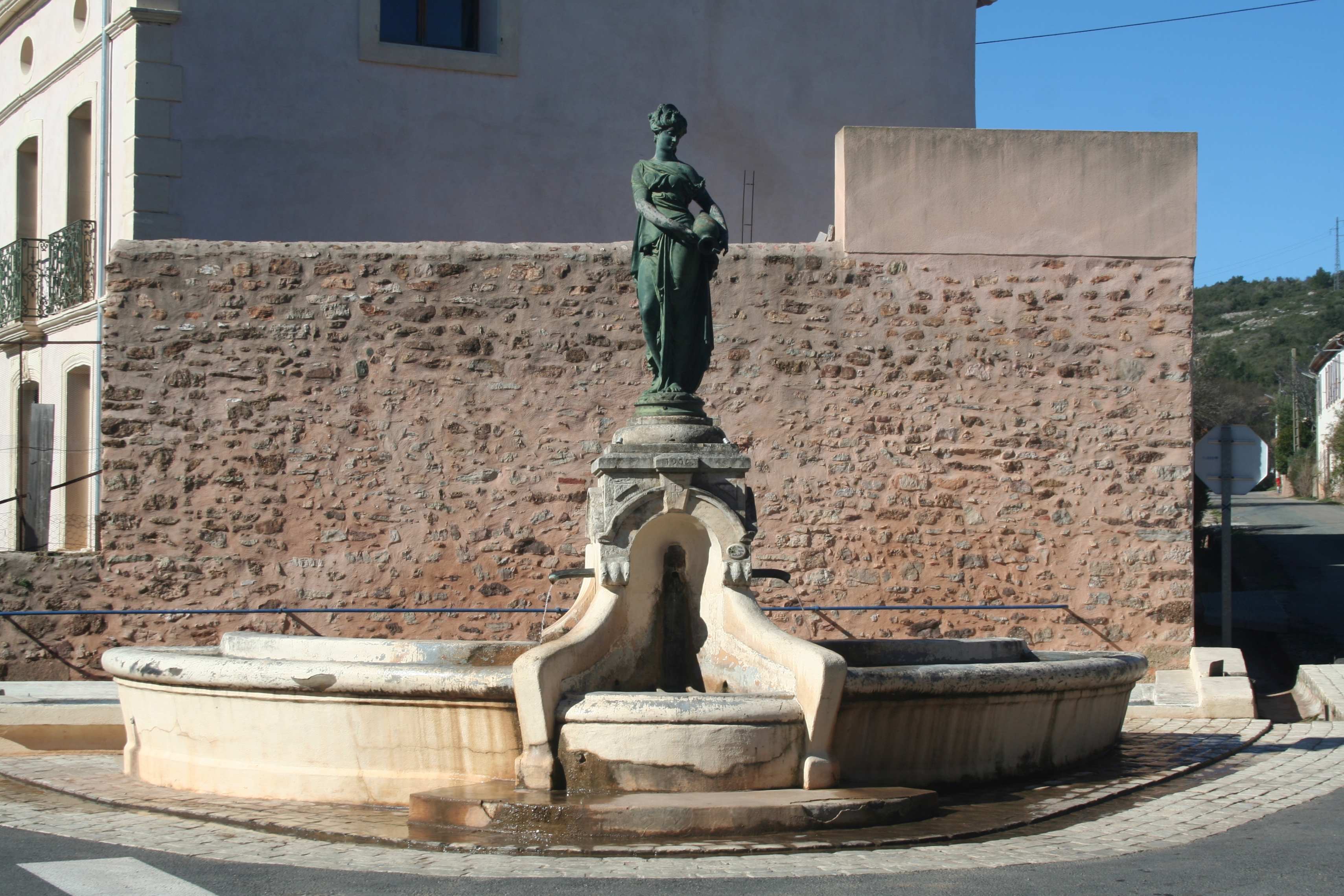 Cazedarnes (Hérault) - fontaine